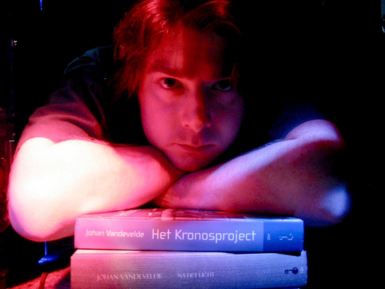 Jeugdauteur Johan Vandevelde. Deze afbeelding mag vrij gebruikt worden.